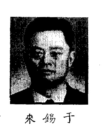 中文（中国大陆）: 制憲國民大會代表